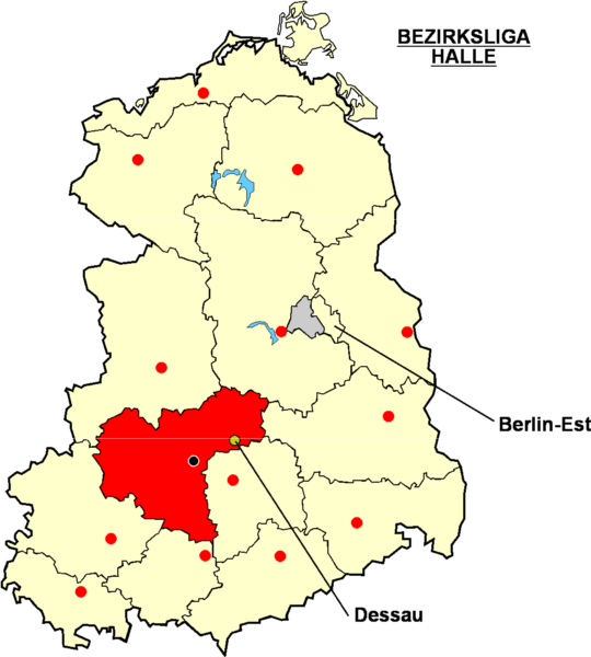 Localisation de Dessau dans la "Bezirksliga Halle" Catégorie:Logo de clubs de football - Allemagne